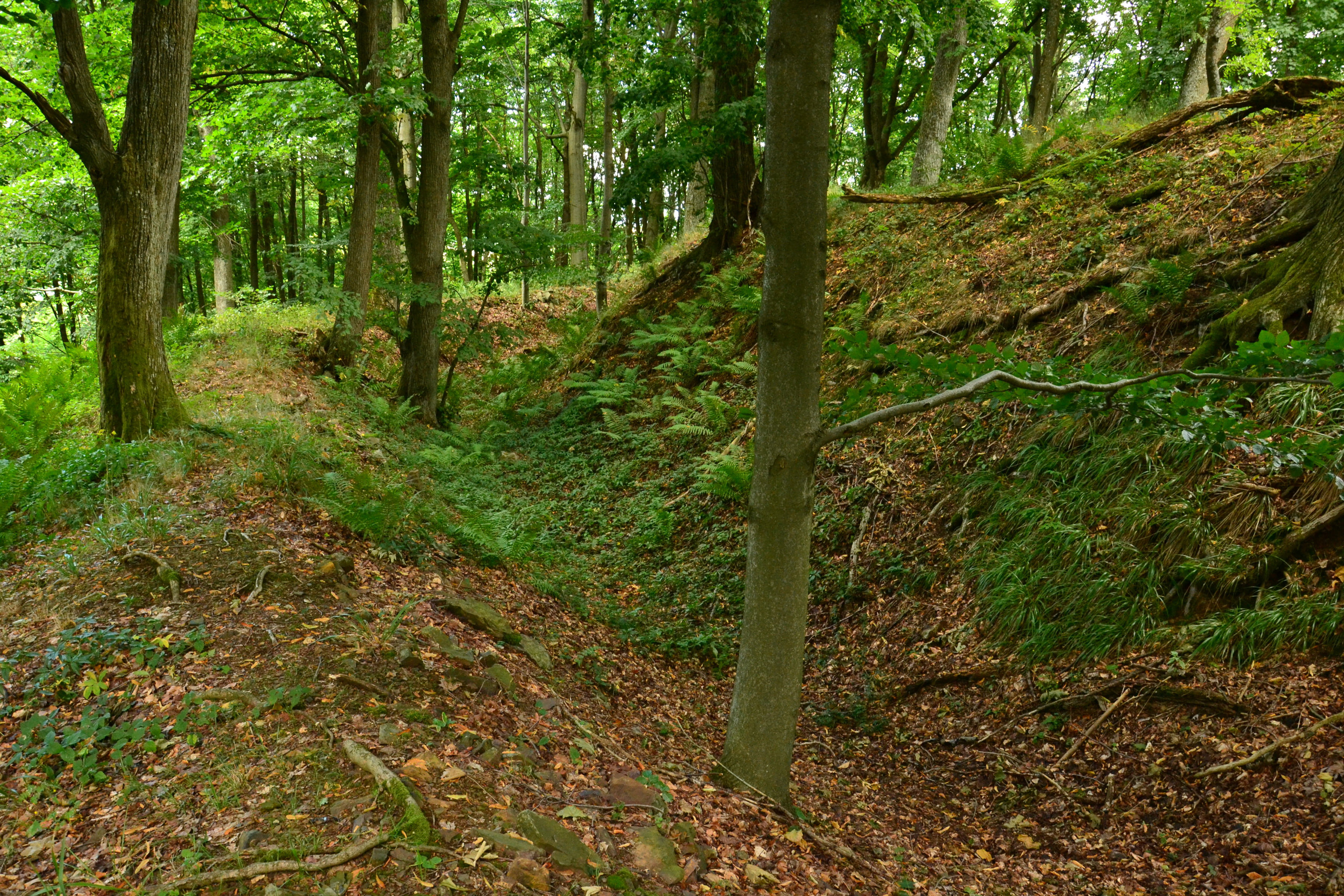 Opevnění